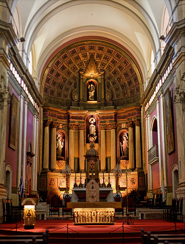 Catedral Metropolitana de Montevideo